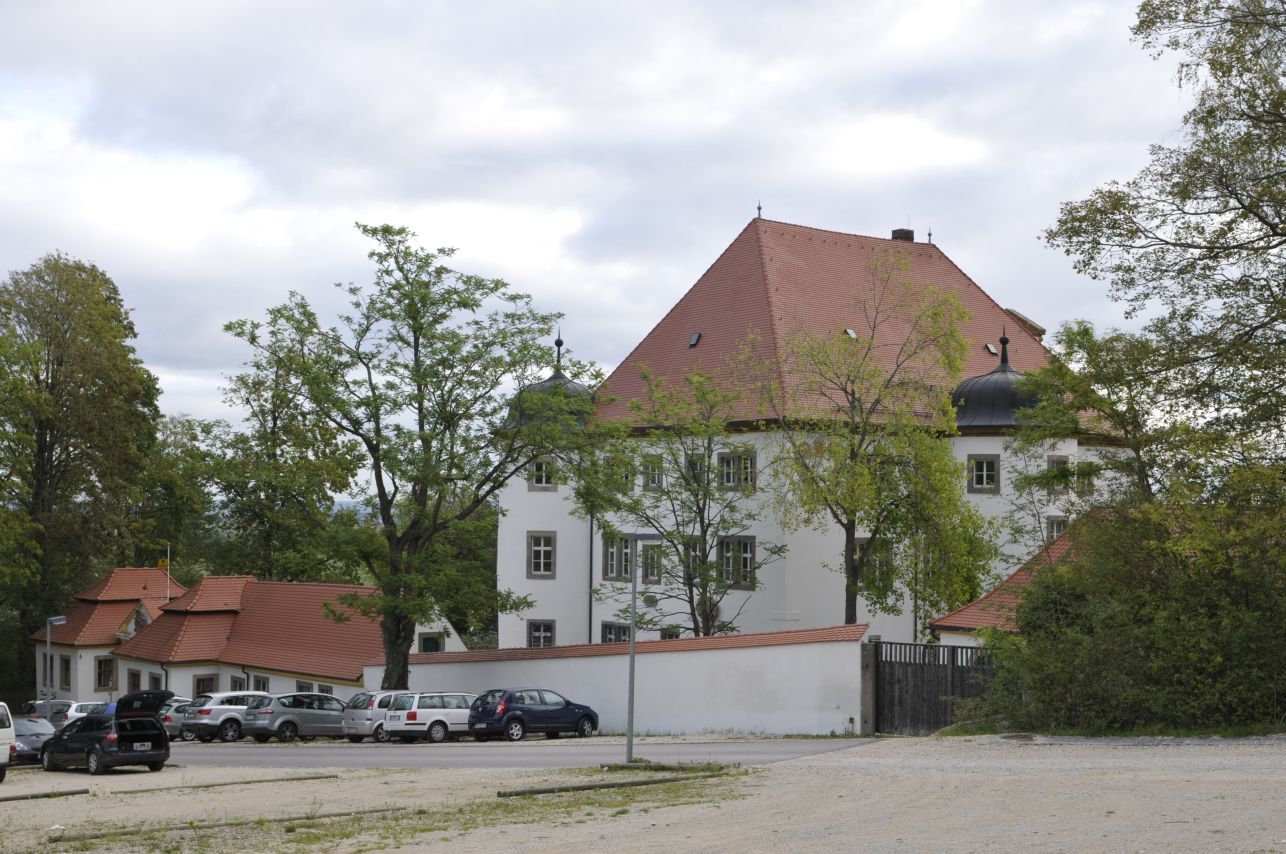 Schloss Reimlingen Nordostfront